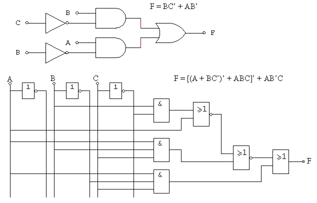 Esquemas lógicos